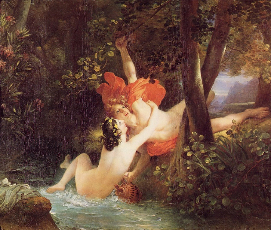 ? × ? cm